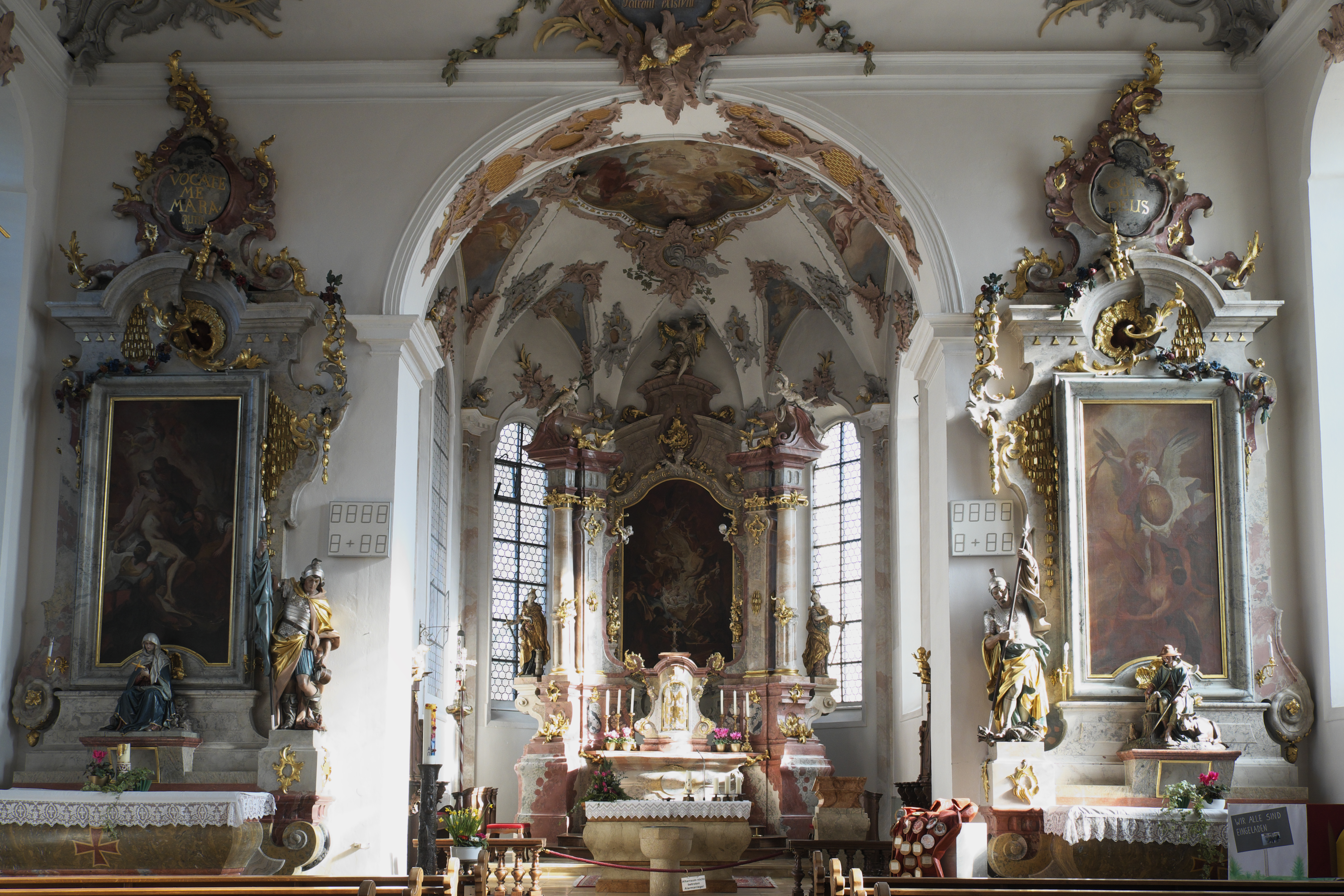 Katholische Pfarrkirche St. Martin in Altheim (bei Riedlingen) im Landkreis Biberach (Baden-Württemberg/Deutschland), Innenraum